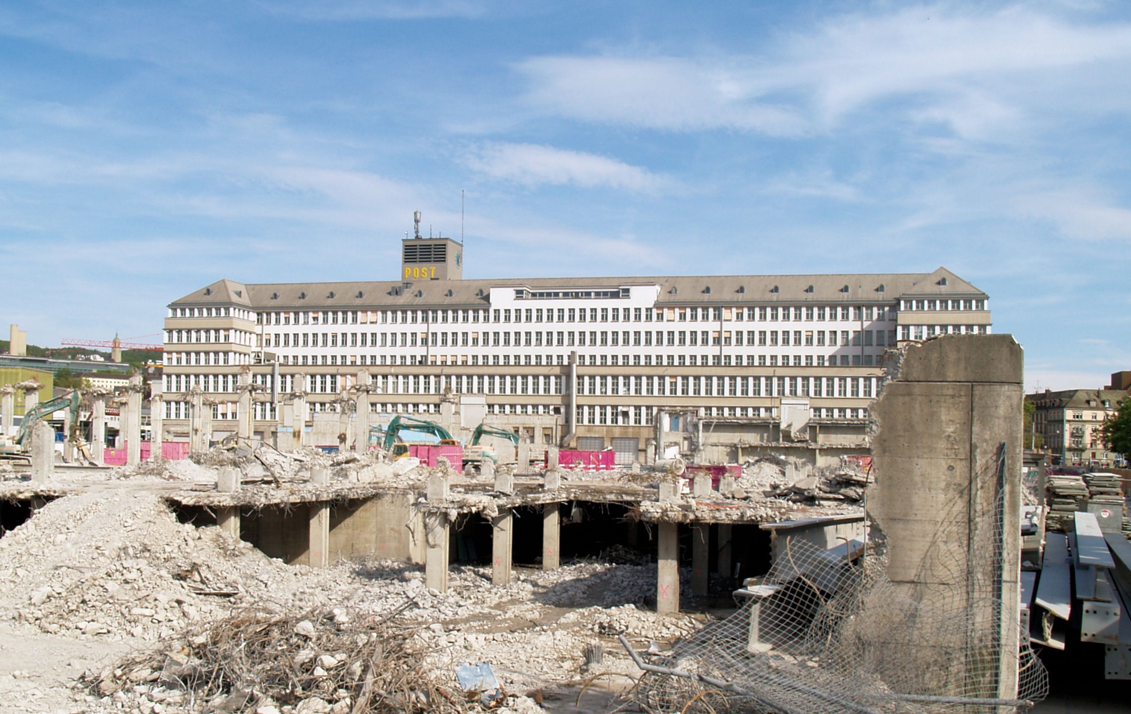 Die Rückseite der alten Sihlpost in Zürich. Nach Abbruch der neuen Shilpost